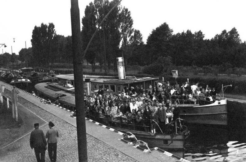 Schiffe in der Schleuse Grosswusterwitz Illus-Bittner Auf dem Wasserwege nach Magdeburg, 1.7.47 U.B.z.: Die Schleuse Grosswusterwitz. 627-47